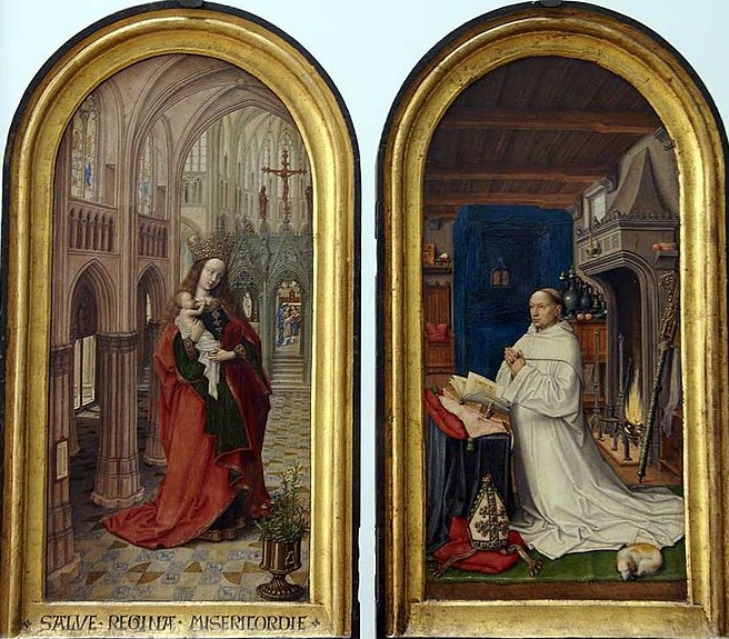 Diptych with Abbot Christiaan de Hondt, Koninklijk Museum voor Schone Kunsten, Antwerp.